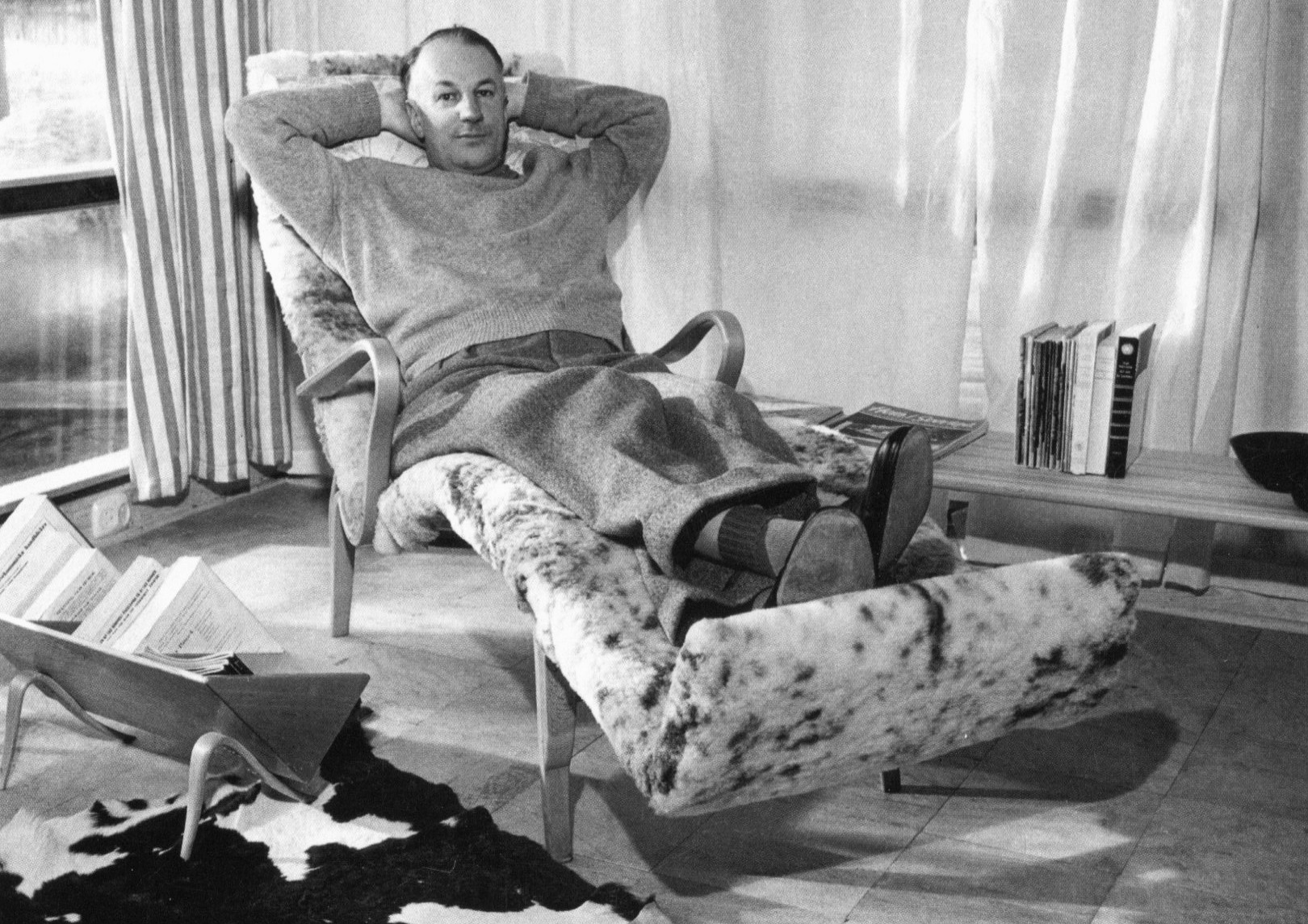 Bruno Mathsson på en Pernilla 3 i sin bostad